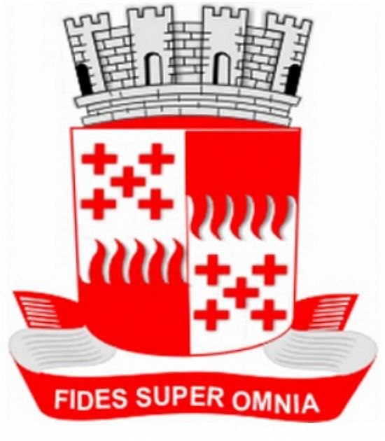 Jeremoabo brasão